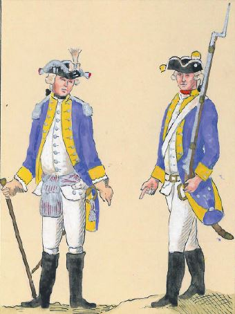 71. Regiment Pieszy Grabowskiego